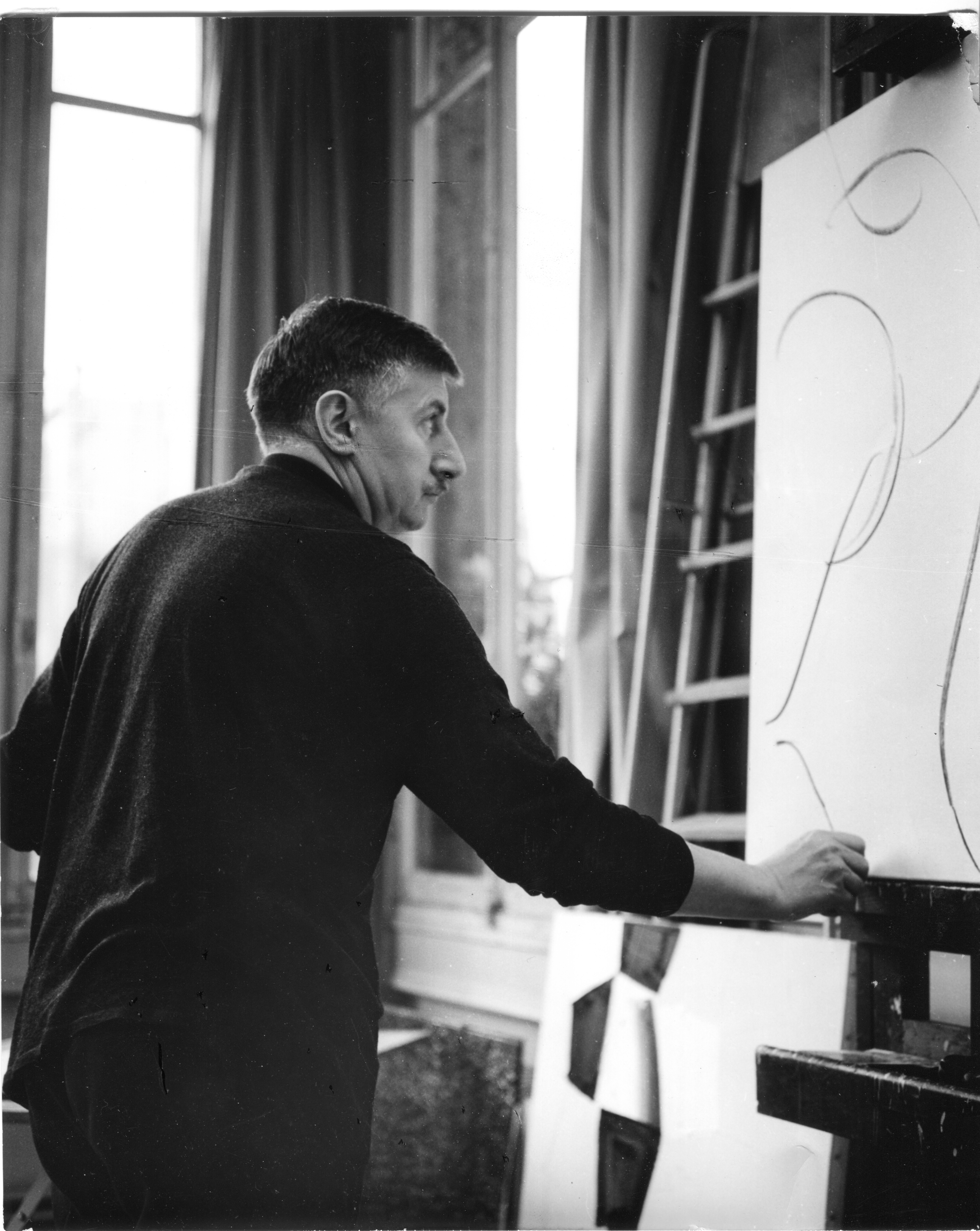 Jacques Busse dans son atelier